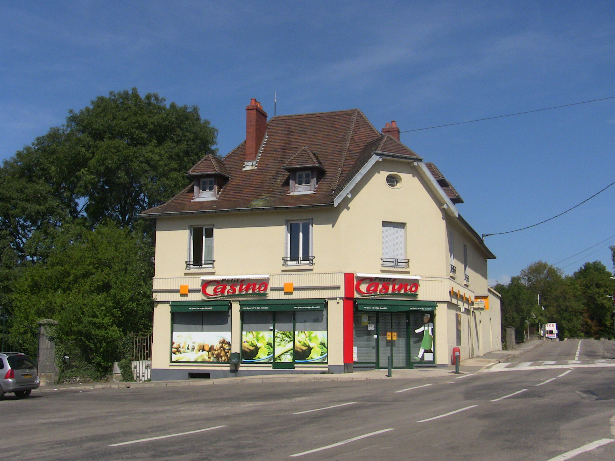 Enseigne Casino à Bregille, dans la ville de Besançon (Doubs, France).